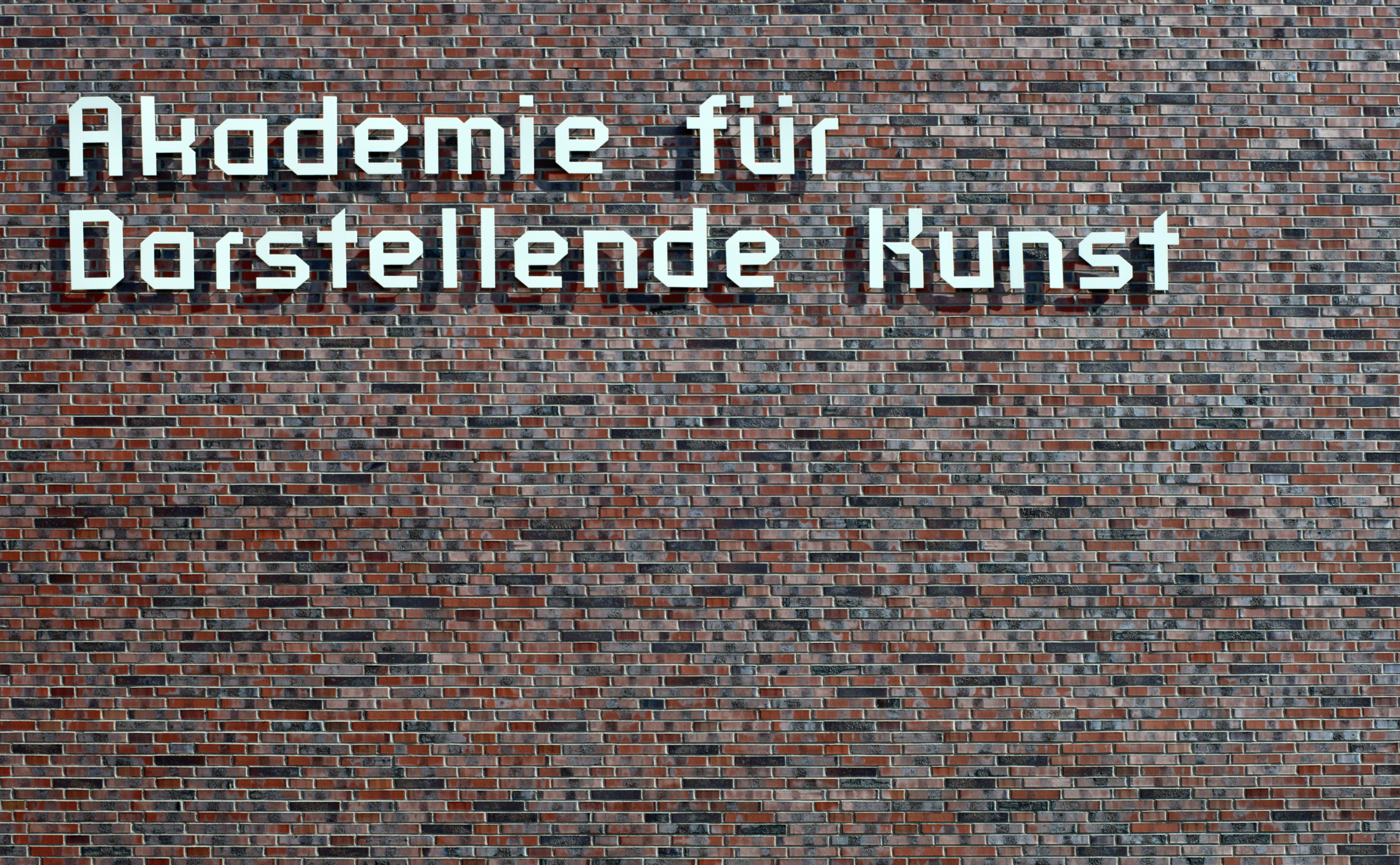 Gebäudemauer der Akademie für darstellende Kunst in Ludwigsburg